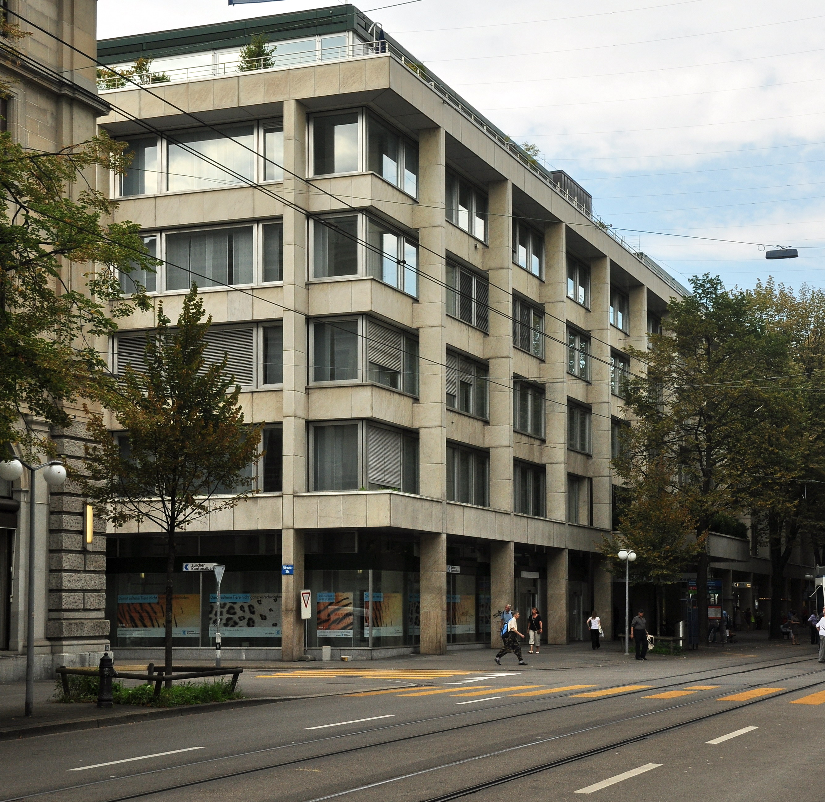 Historisches Archiv der Zürcher Kantonalbank, Bahnhostrasse in Zürich-City (Switzerland)